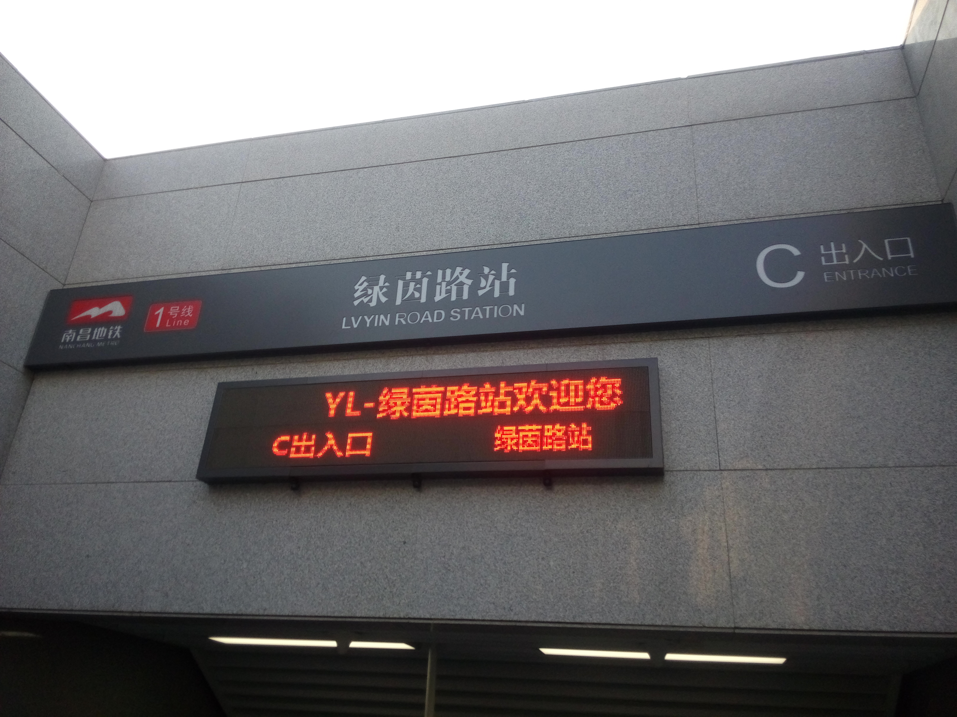 绿茵路站C出入口